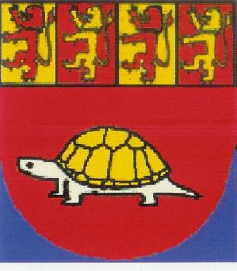 Armoirie ville d'Obyctov.